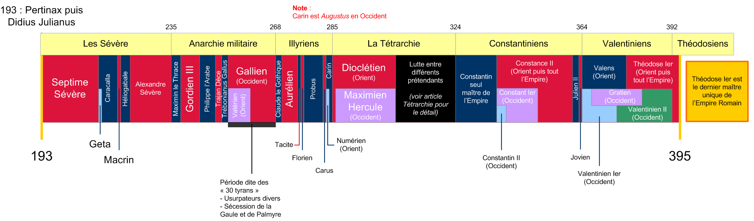 Frise chronologique réalisée sur Microsoft Visio retraçant les principaux empereurs romains légitimes depuis 192 jusqu'à 395.